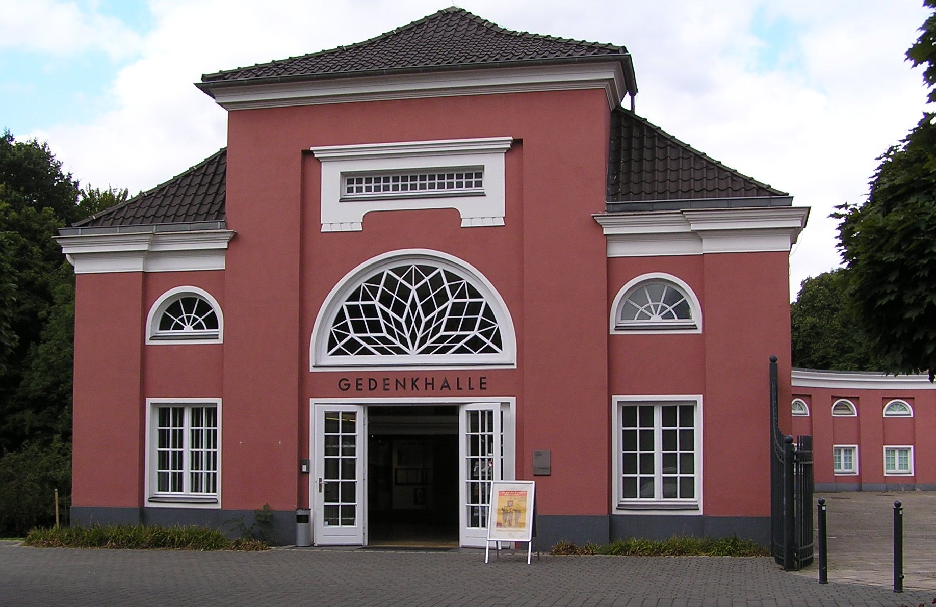 Side building "Gedenkhalle" ("remembrance hall") of the castle "Schloss Oberhausen", Oberhausen